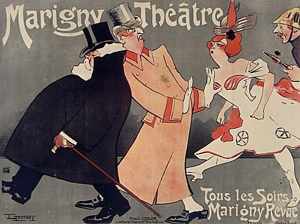 Marigny Theâtre. Tous les soirs Marigny Revue. Poscolo Carlos Avril... (défilé de célébrités conduit par le Président Armand Fallières) Affiche de Maurice Lourdey. Imprim. Louis Geisler.